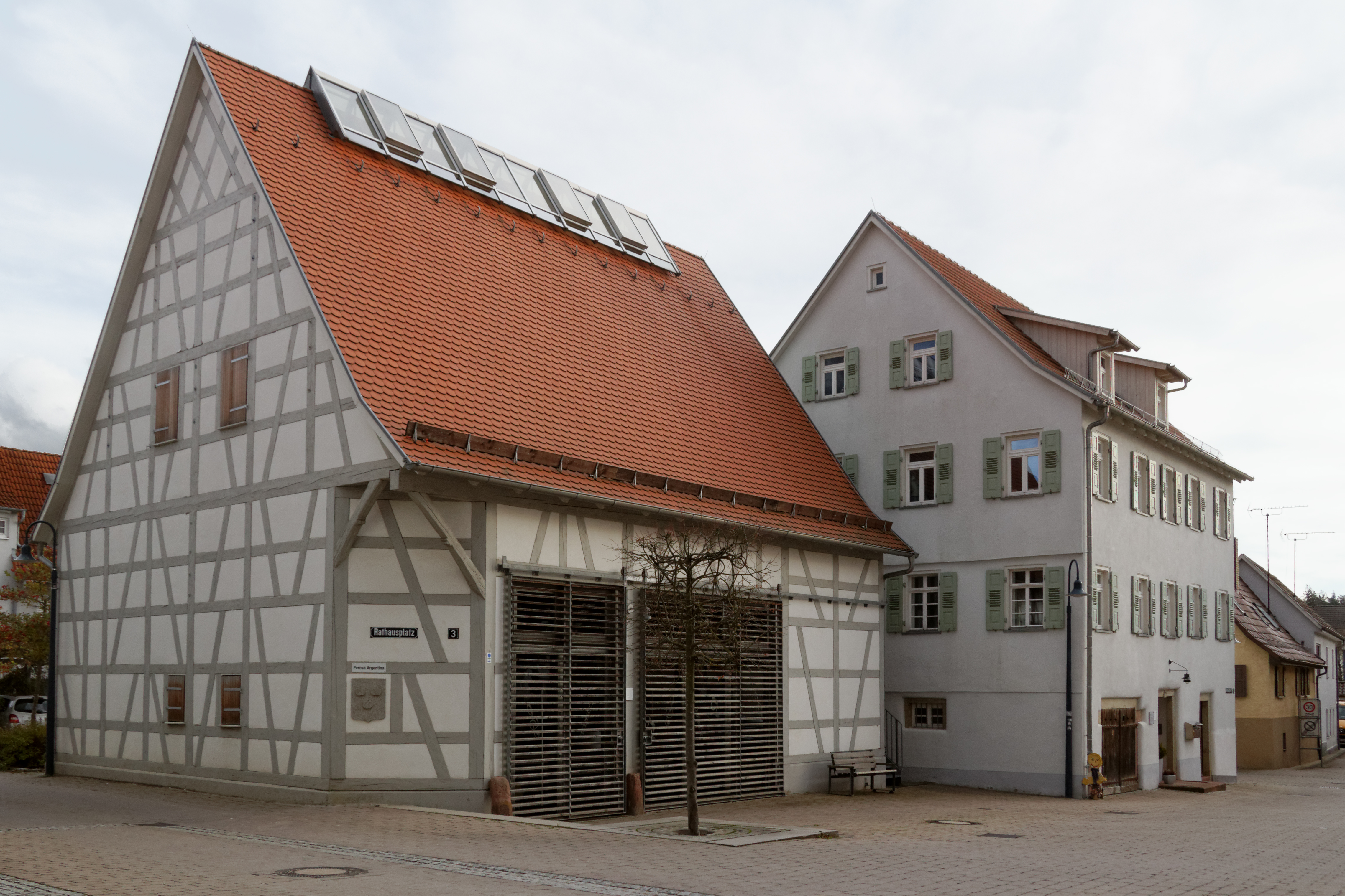 Zehntscheuer und altes Rathaus in Perouse, einem Stadtteil von Rutesheim (Baden-Württemberg).